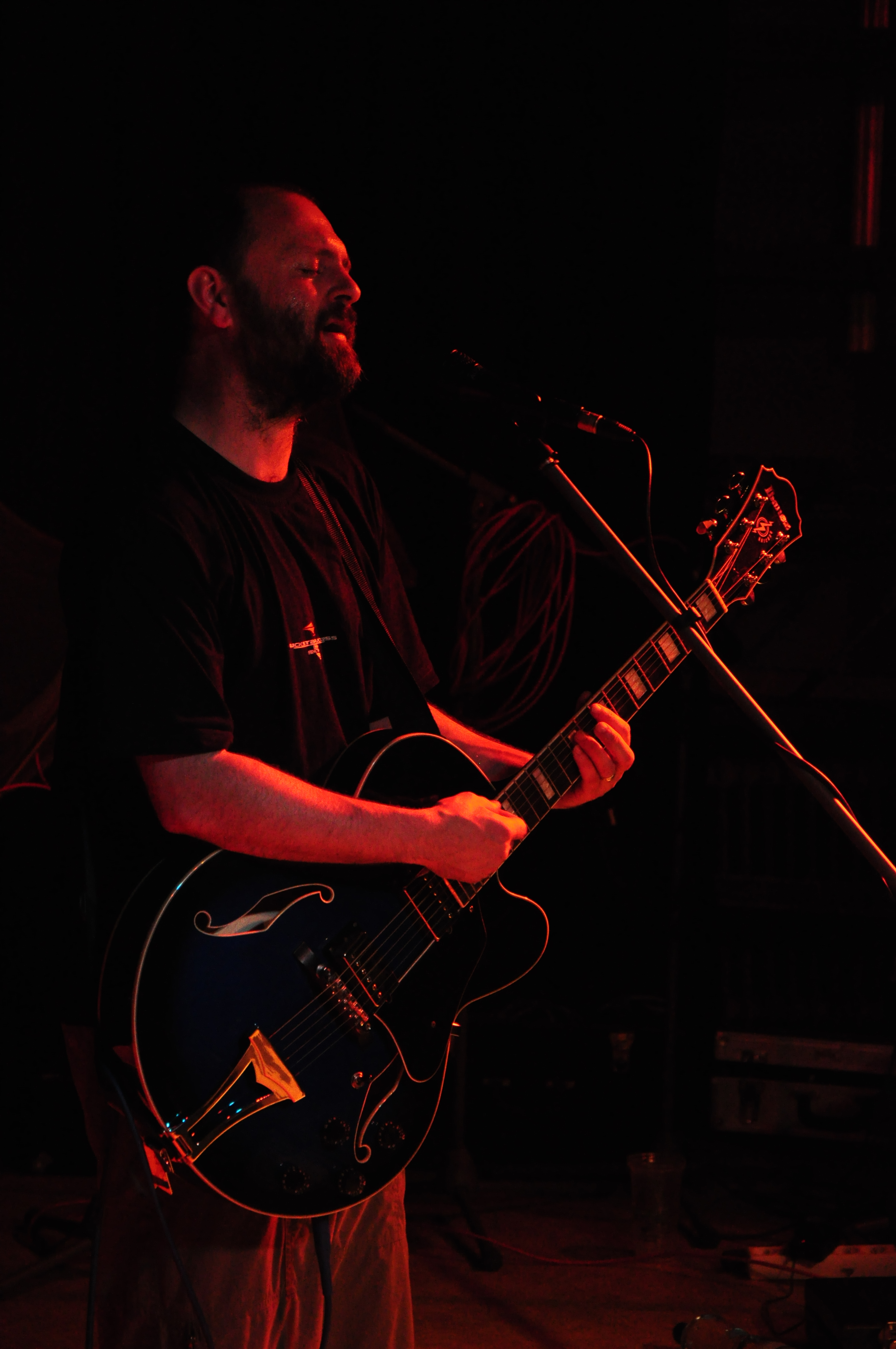 Marcel Kříž (Marcel Kříž a Pohublá zrzka) in Máme na to?! music festival, Chotěboř, Czech Republic